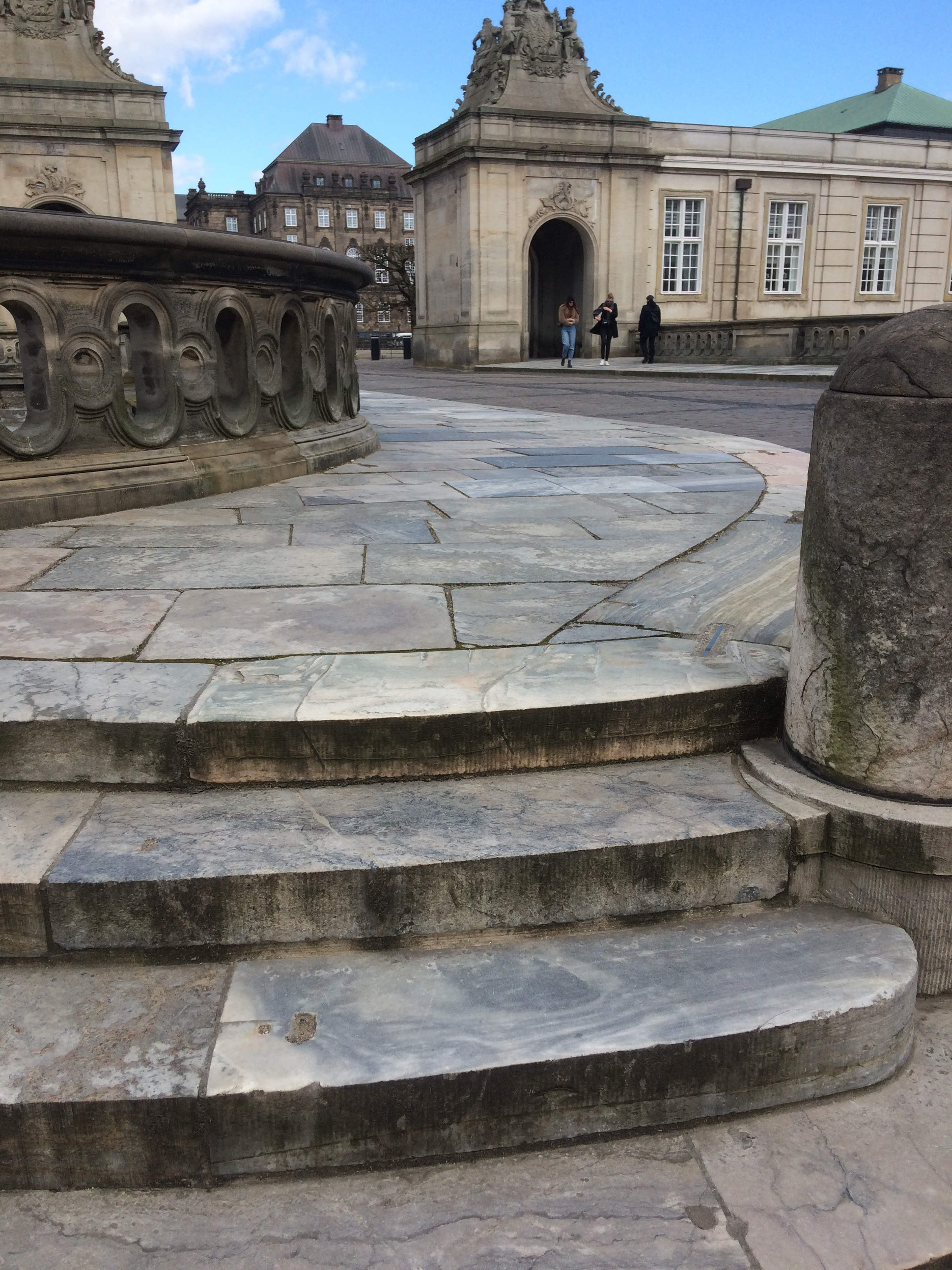 Marmorbelægning på Marmorbroen ved Frederiksholms Kanal i København